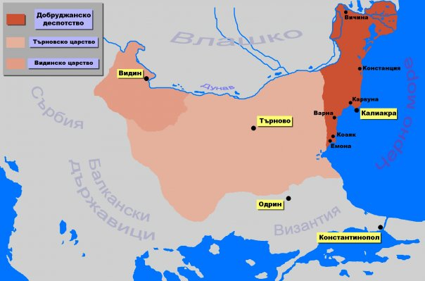 dobruca